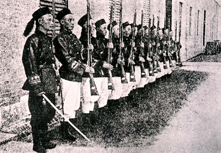 定武軍（小站練兵）の儀仗部隊。